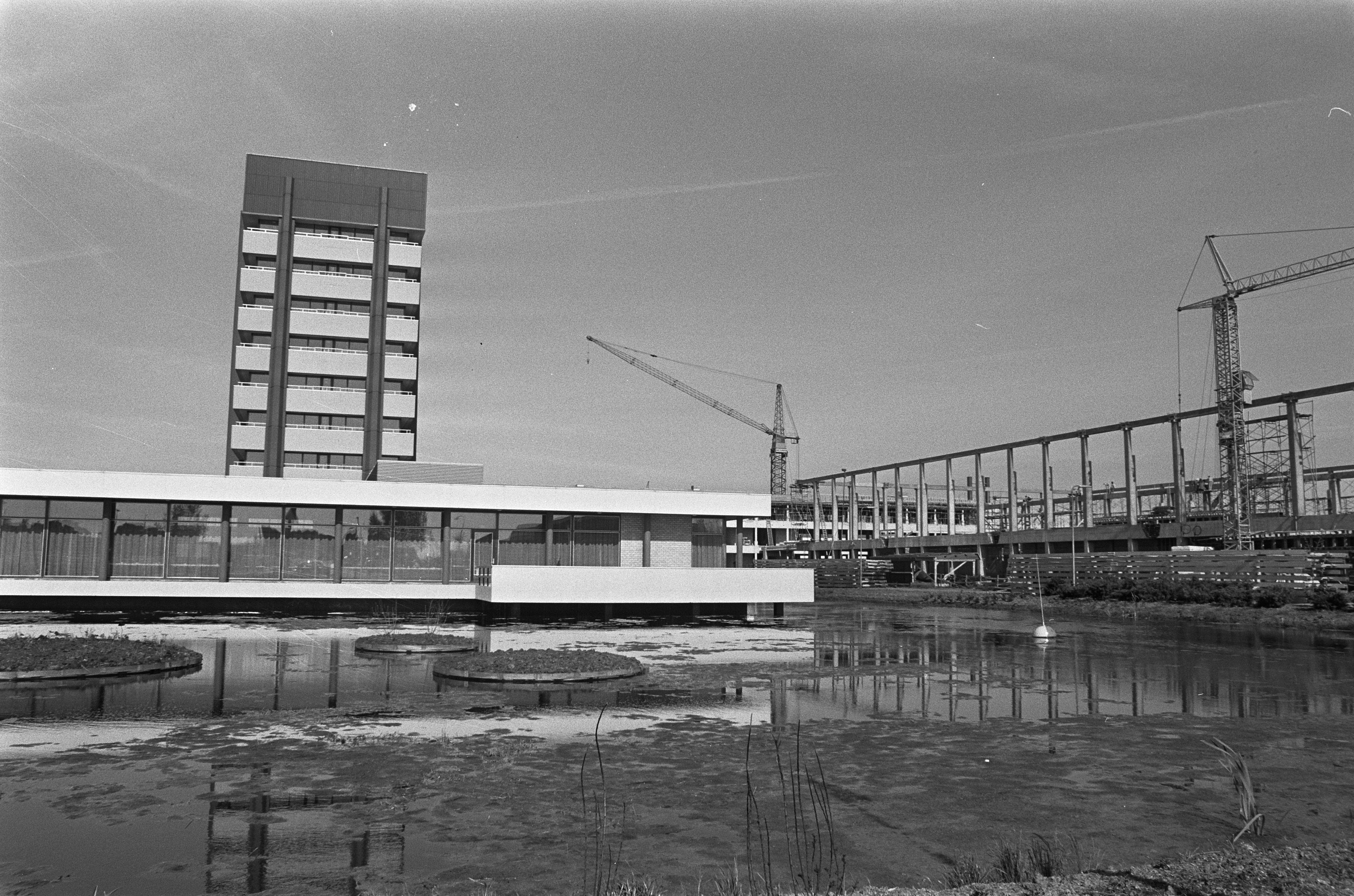 Collectie / Archief : Fotocollectie Anefo Reportage / Serie : [ onbekend ] Beschrijving : Nieuwbouwcomplex Waterloopkundig Laboratorium te Delft door koningin Juliana geopend met druk op de knop, exterieur Datum : 22 mei 1973 Locatie : Delft, Zuid-Holland Trefwoorden : koninginnen, laboratoria, openingen Persoonsnaam : Juliana (koningin Nederland) Fotograaf : Verhoeff, Bert / Anefo Auteursrechthebbende : Nationaal Archief Materiaalsoort : Negatief (zwart/wit) Nummer archiefinventaris : bekijk toegang 2.24.01.05 Bestanddeelnummer : 926-4285